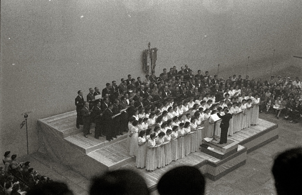 Título original: El Orfeón Donostiarra en un frontón de Eibar (6/14) Localización: Éibar (Guipúzcoa)